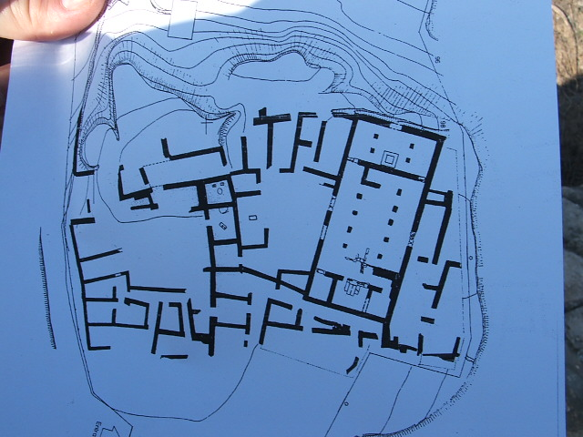 Dibujo de la planta del poblado visigodo de El Bovalar (Seròs Lleida)